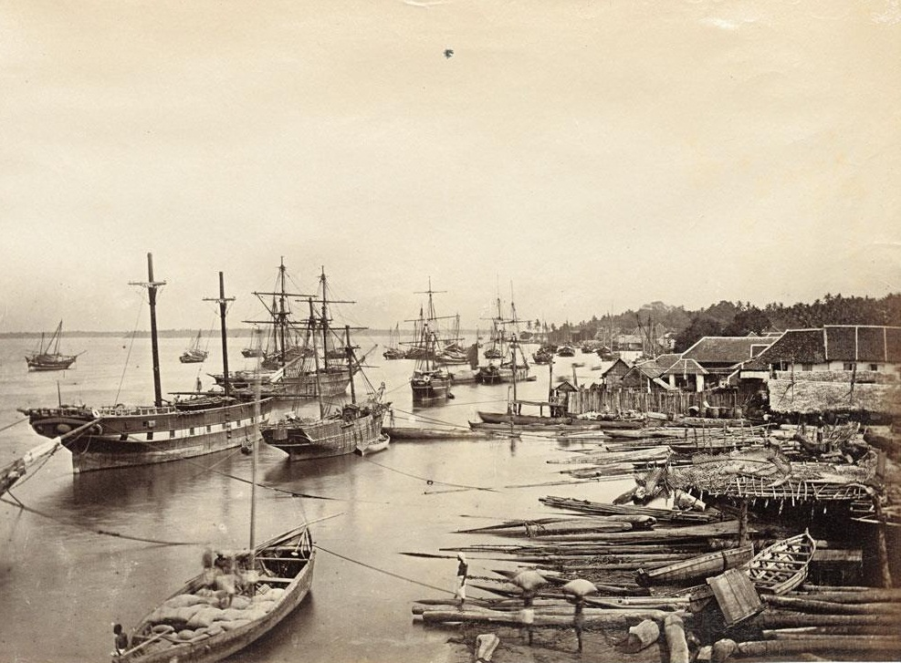 കൊച്ചിയിലെ ഹാർബർ. കപ്പലുകളിലേയ്ക്ക് ചരക്ക് കയറ്റുന്നുണ്ട്.